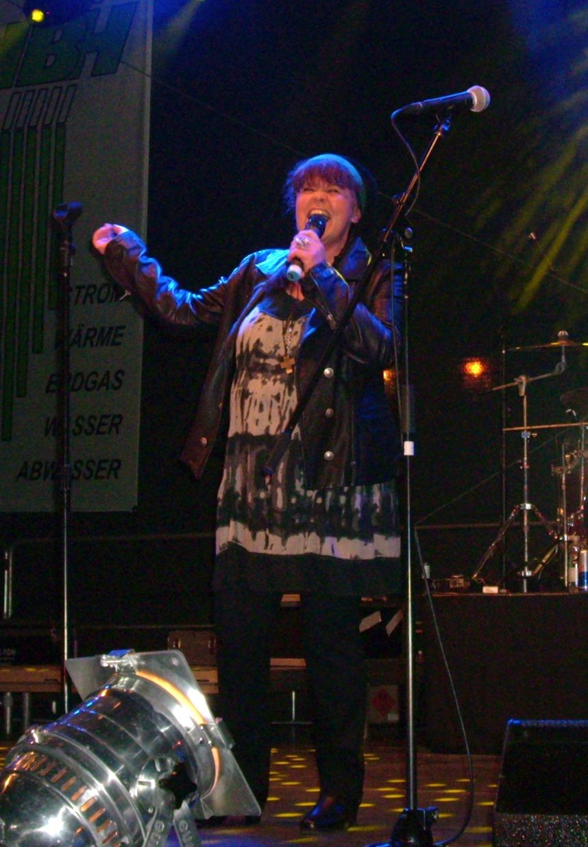 Sängerin Chris Doerk auf dem Stadtfest in Hoyerswerda